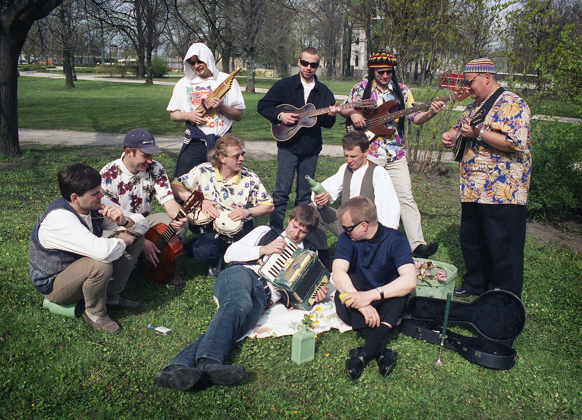 Väikeste Lõõtspillide Ühing 1998